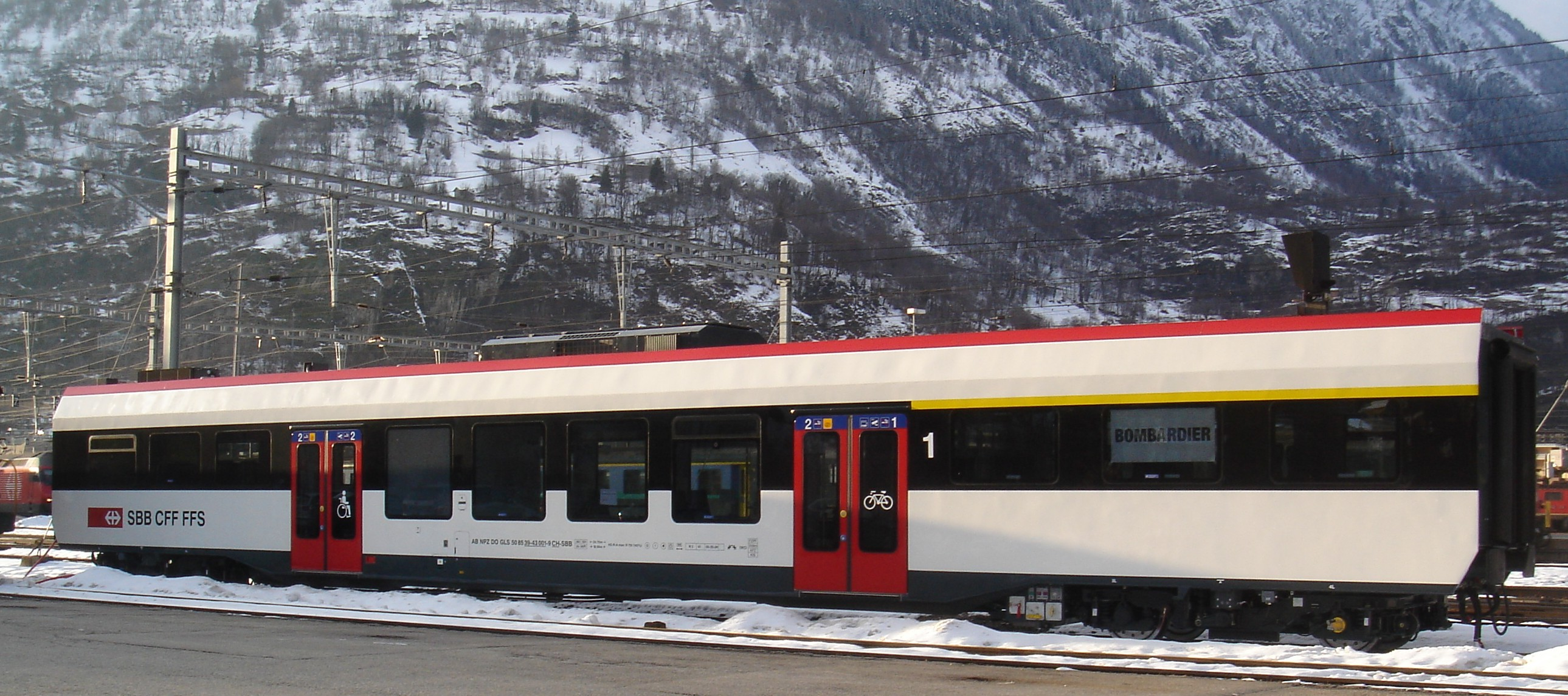 Neuer NPZ Domino Zwischenwagen für den Glarner Sprinter in Brig